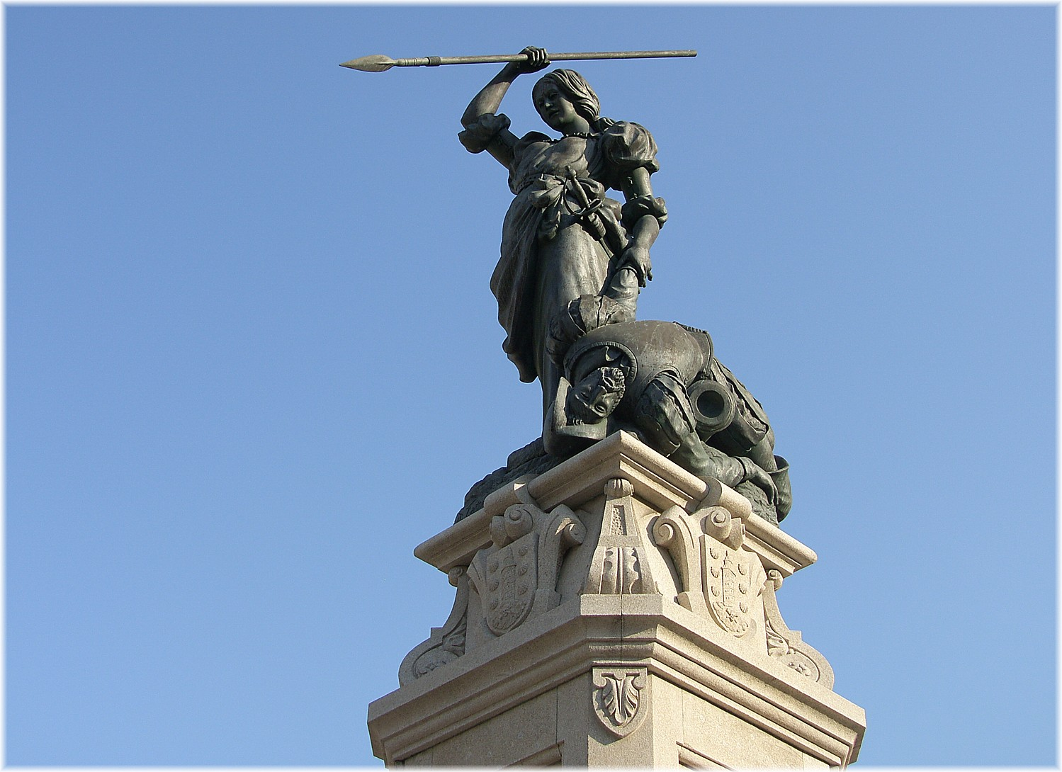 María Pita, a heroína coruñesa (1589)